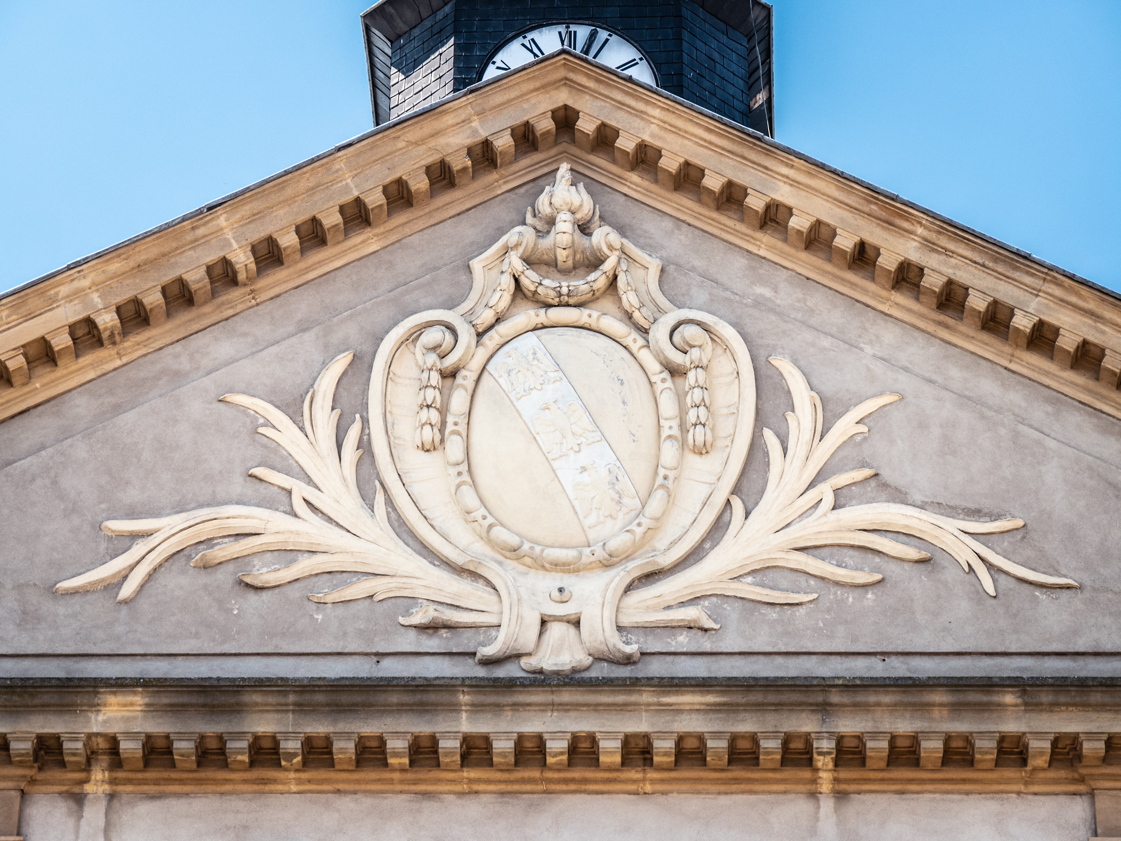 Ecole située à Montigny-lès-Metz